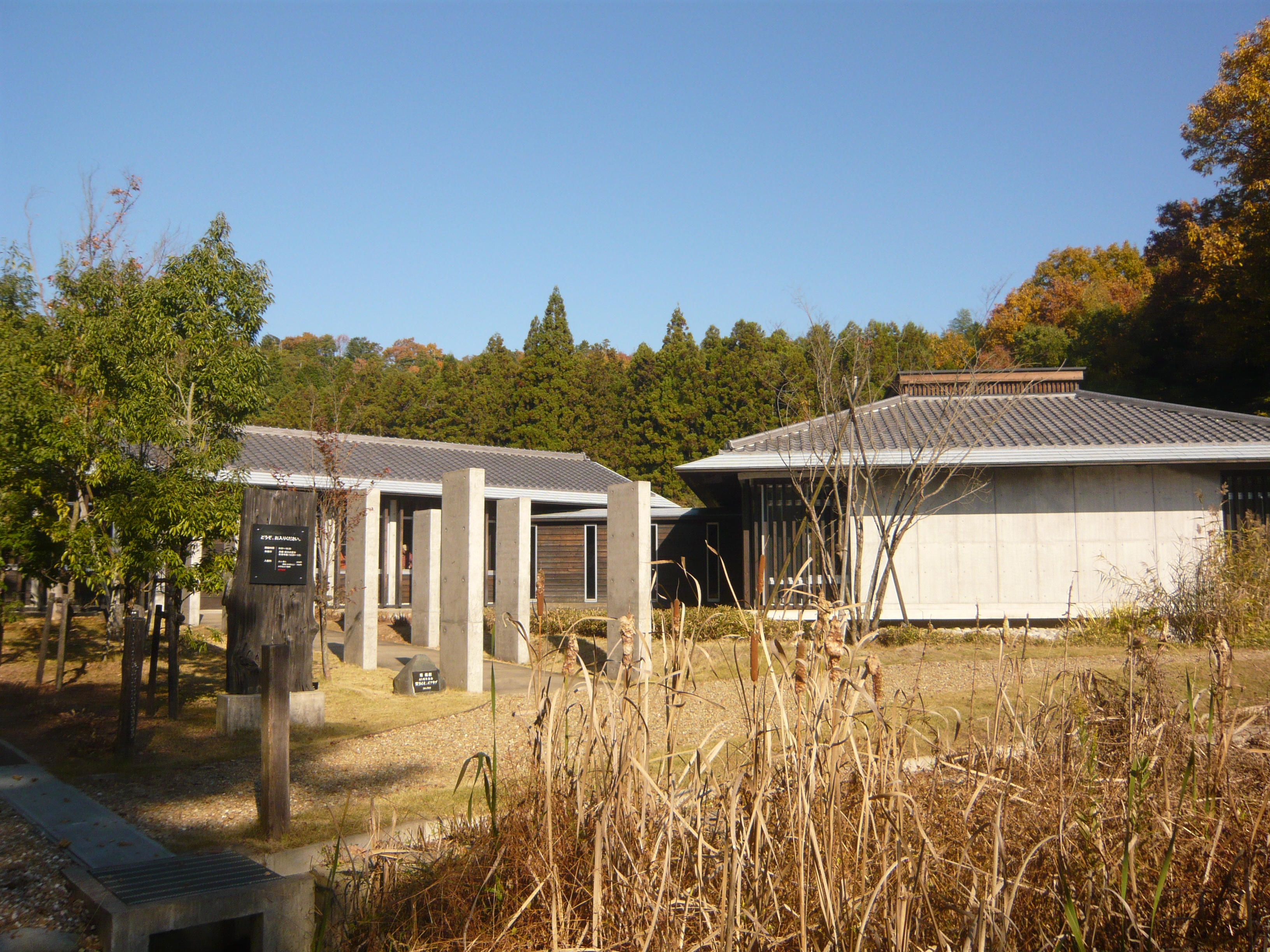 Enku Museum 関市円空館（関市円空館）,Seki,Gifu,Japan（岐阜県関市）で撮影。